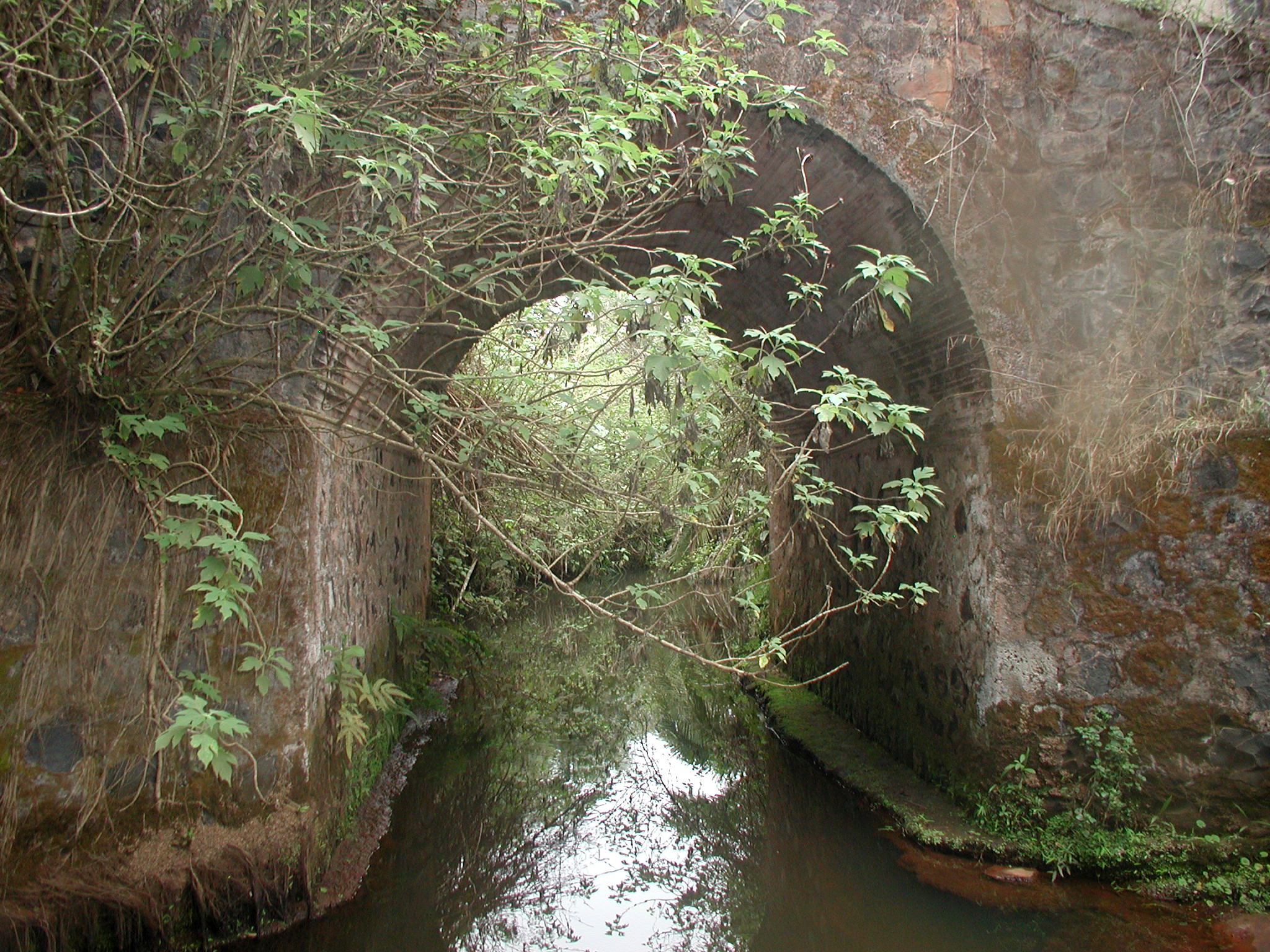 Pont centenaire construit avec des bambous de chine à Fongo-Tongo à Dschang